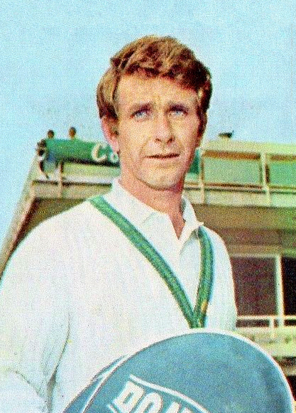 CAMPIONI dello SPORT 1969/70-n.402- MULLIGAN - ITALIA -TENNIS